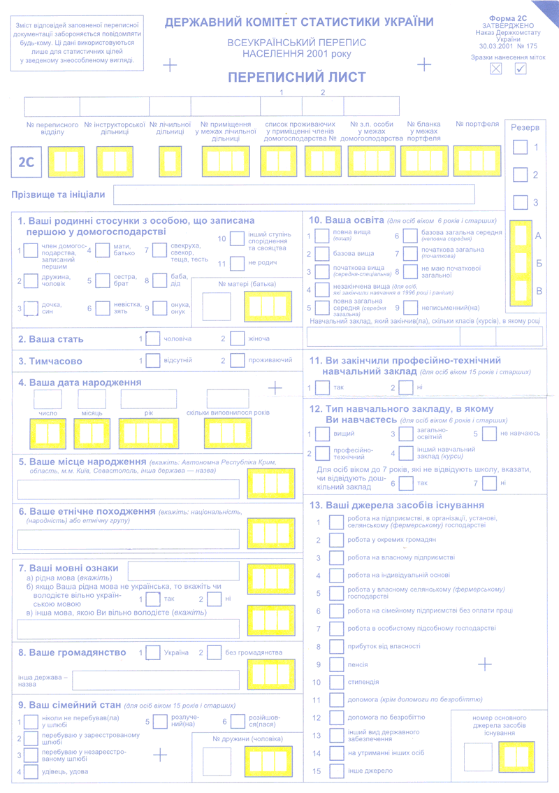 Page of Ukrainian census 2001. Форма 2С утверждена приказом Госкомстата Украины №175 от 30.03.01 года.